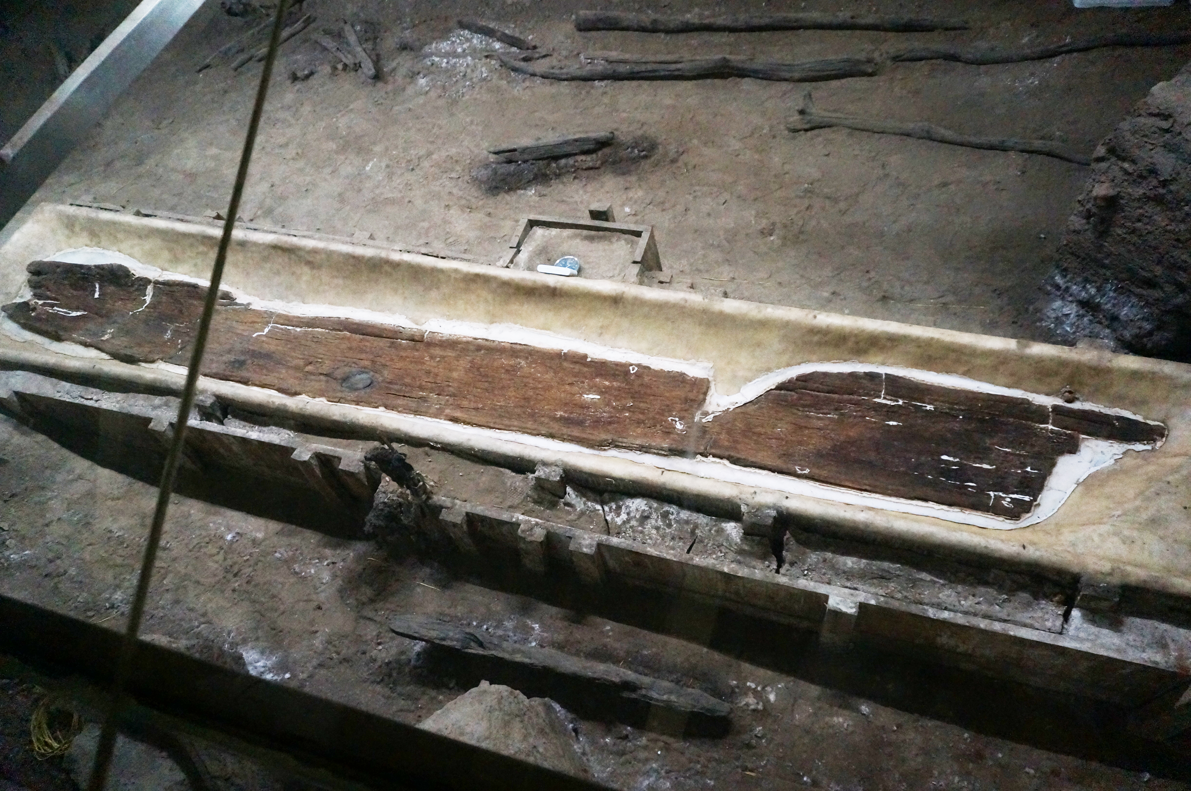 跨湖桥遗址博物馆，遗址厅内的独木舟。